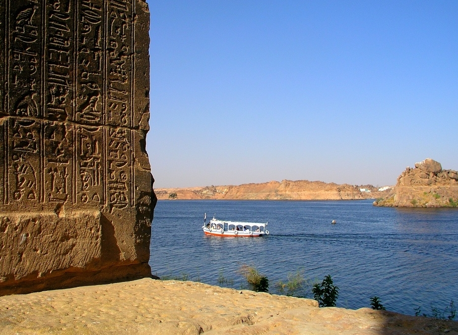 Agilkia, Nile River, Egypt